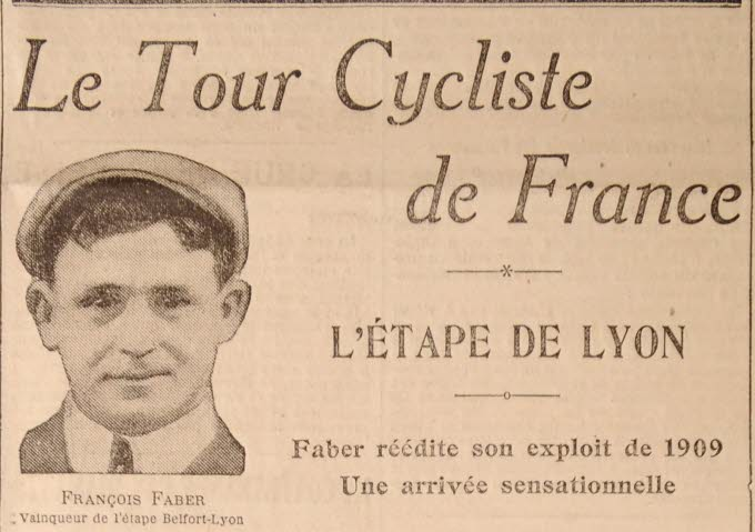 1910 - encart évoquant François Fabert dans Le Progrès.